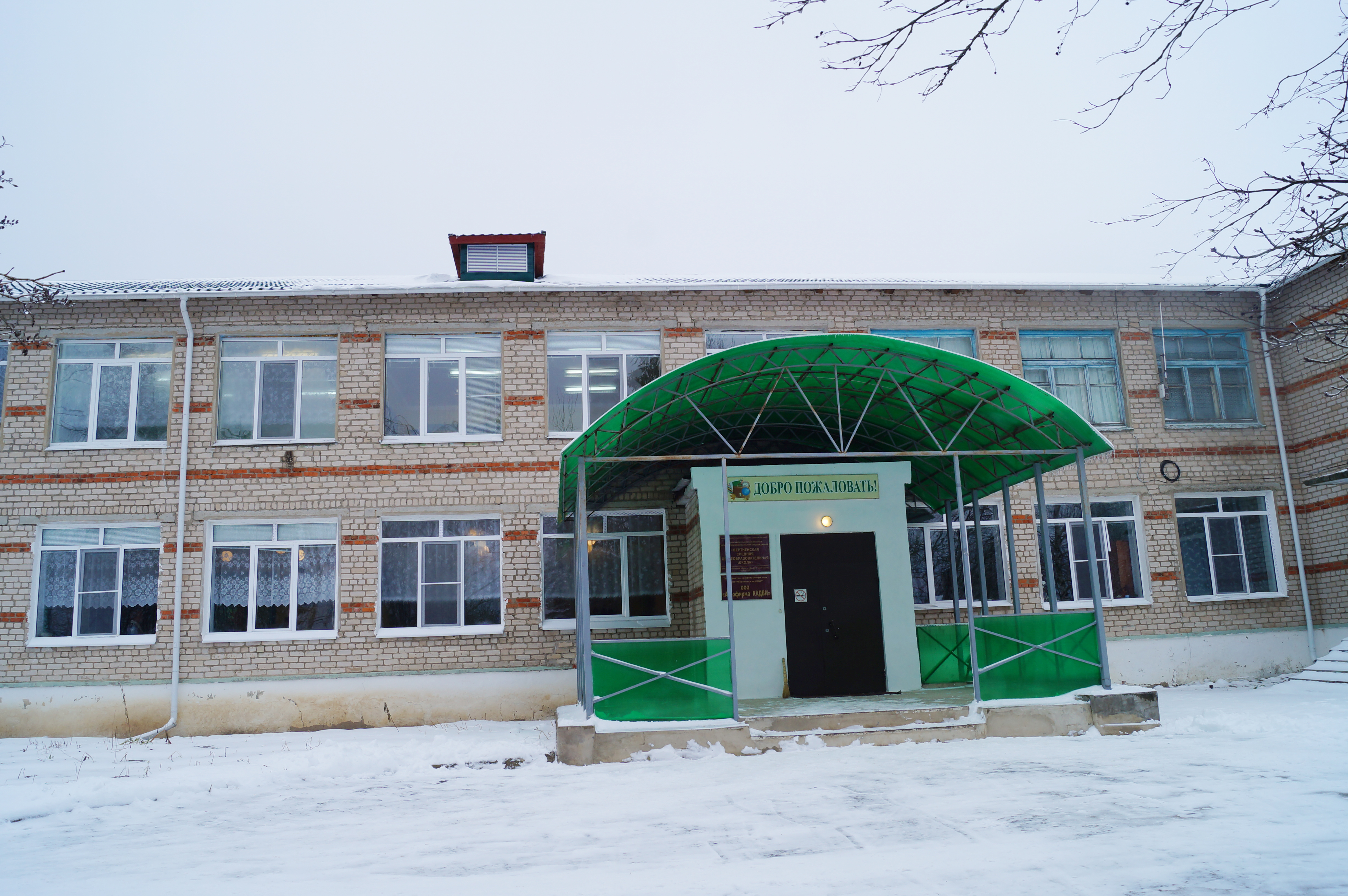 Вёртненская школа, Калужская область